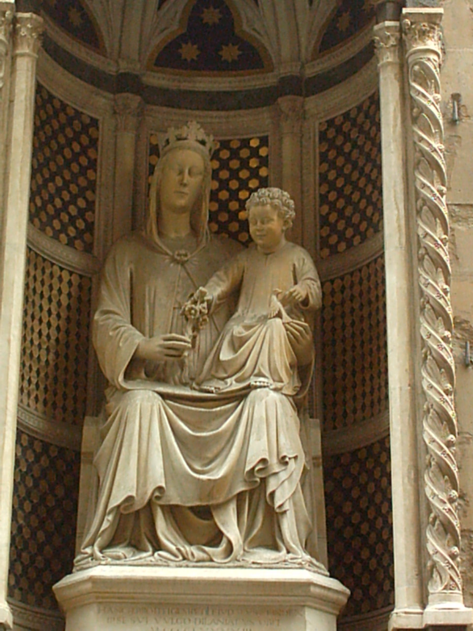 Staua in marmo della Madonna in trono con Gesù bambino patrona dell'Arte dei Medici e Speziali nel tabenacolo della chiesa di Orsanmichele a Firenze- opera attribuita a Pietro di Giovanni Tedesco (notizie dal 1386 al 1402)